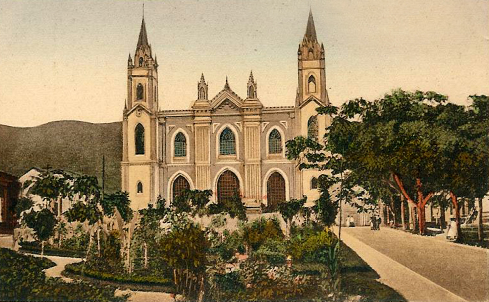 La Iglesia de la Santísima Trinidad en 1874, antes de ser transformada en el Panteón Nacional